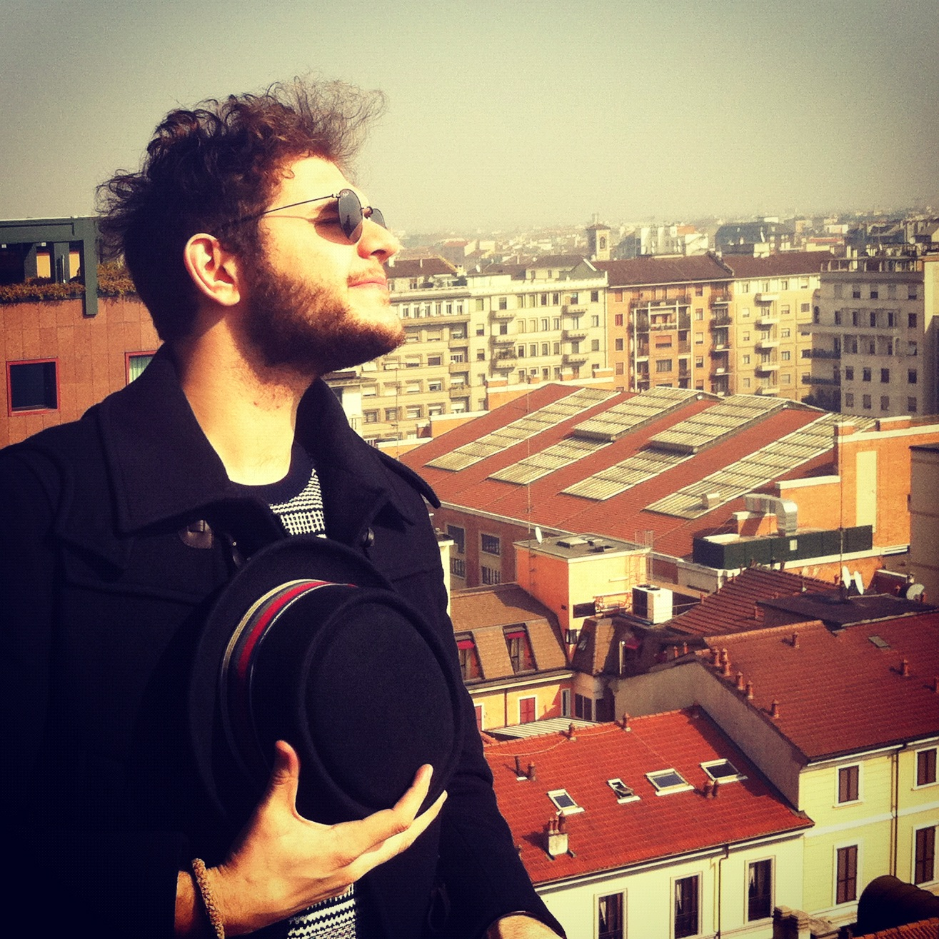 Renzo Rubino - premio della critica Sanremo 2013 sezione giovani